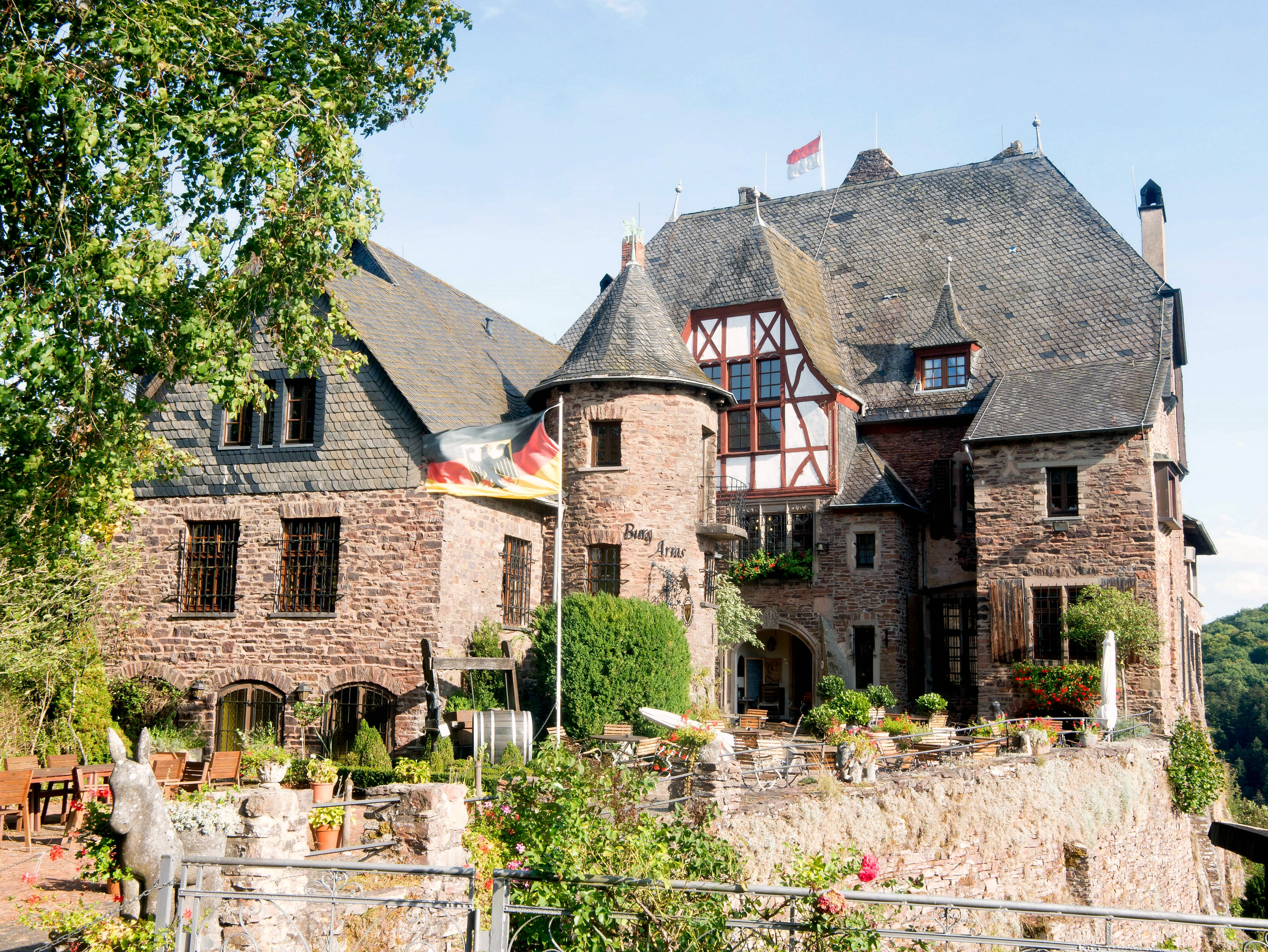 Unter Leitung von Peter Marx entstand zwischen 1907 und 1910 im Auftrag des Bauherrn Wilhelm Traugott Dyckerhoff ein Neubau im Stil einer großbürgerlichen Villa. Die im Privateigentum stehende Anlage wird heute als Hotel und Museum genutzt.